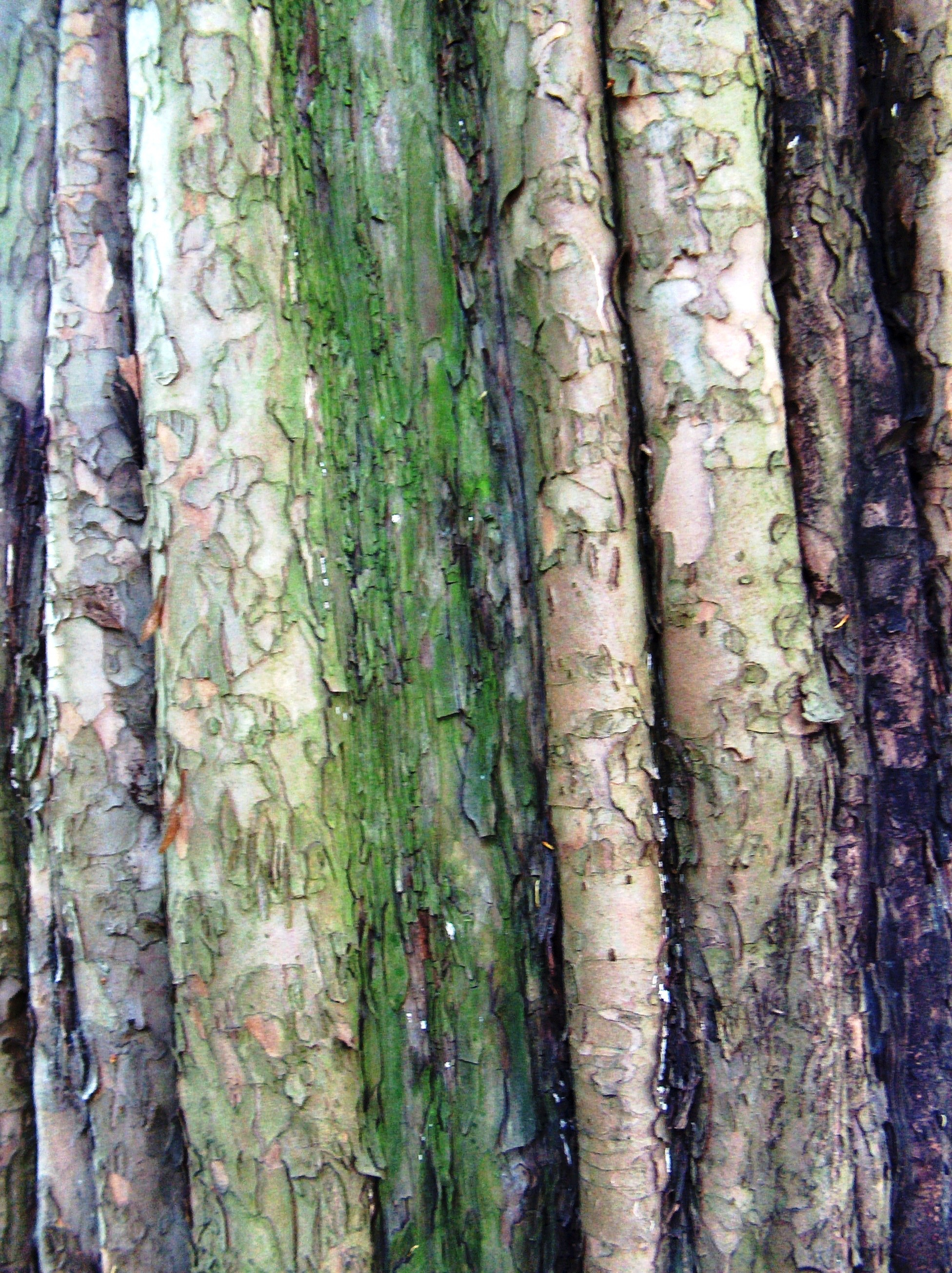 Taxus baccata - Bark